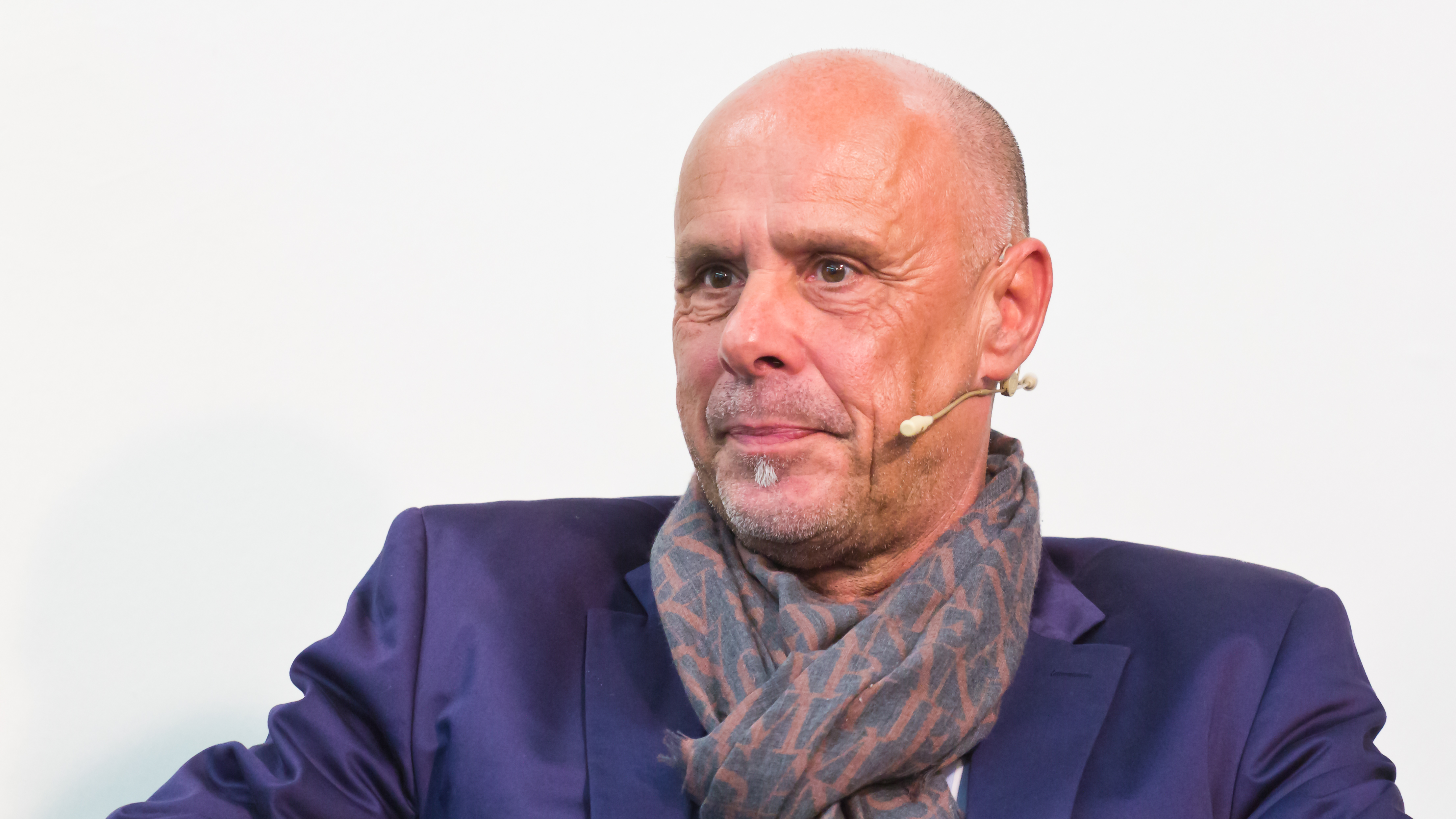 Eröffnung der 5. Internetwoche Köln im Studio DuMont Foto: Harald A. Summa, Geschäftsführer eco e.V.